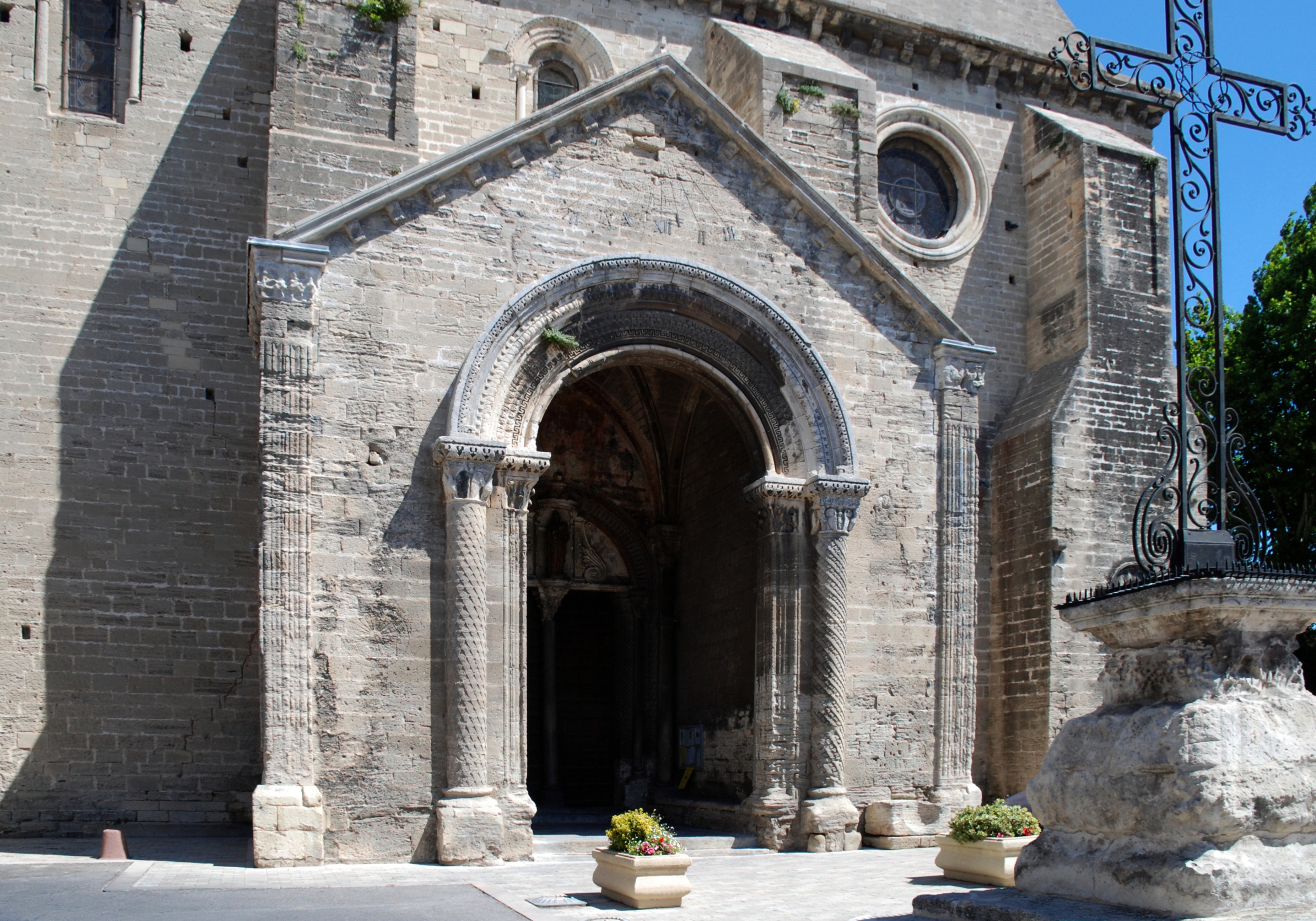 France - Vaucluse - Le Thor